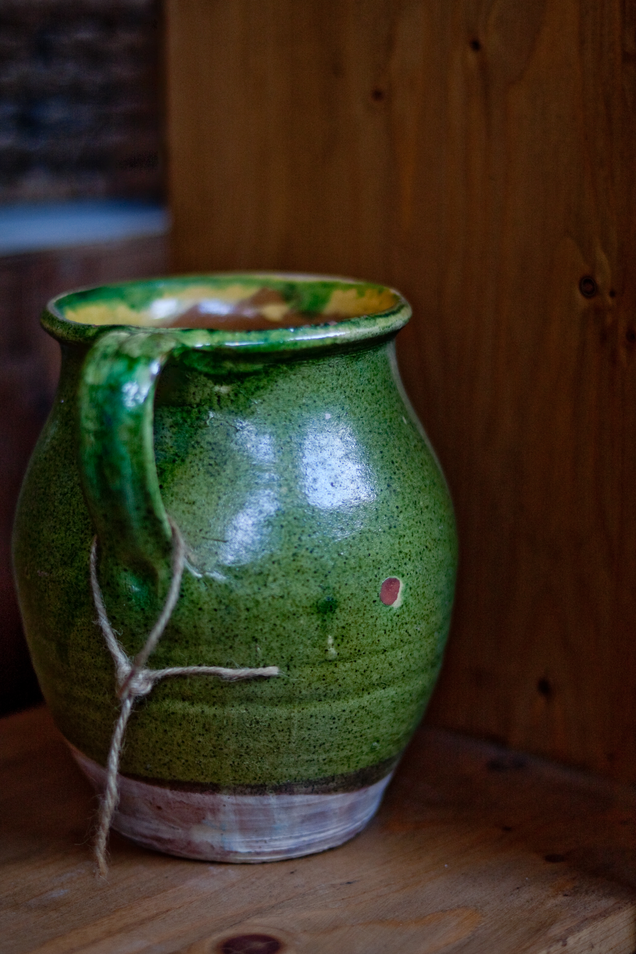 Pichet provençal à vernissure verte